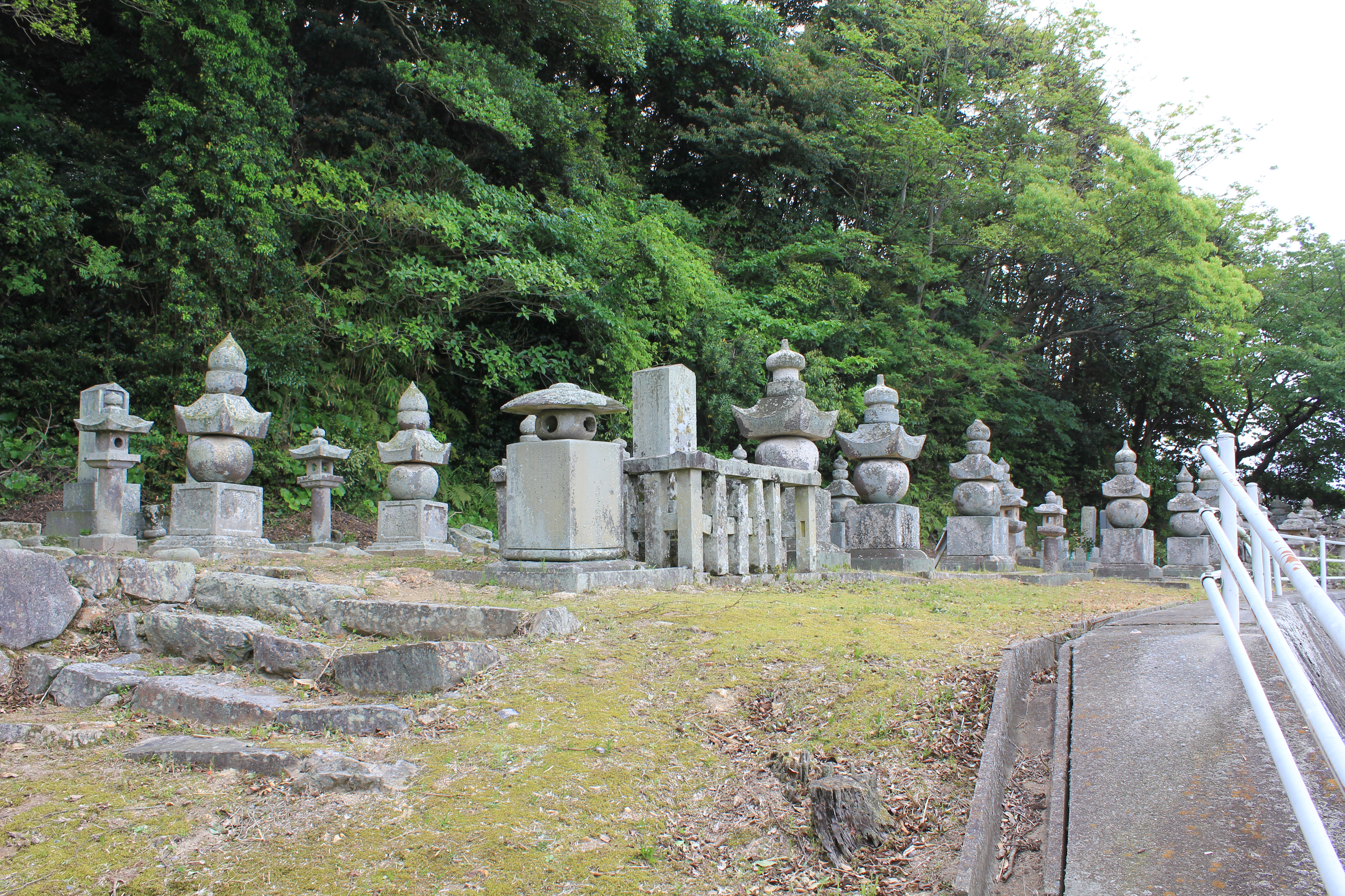 山口県萩市須佐の益田家墓所